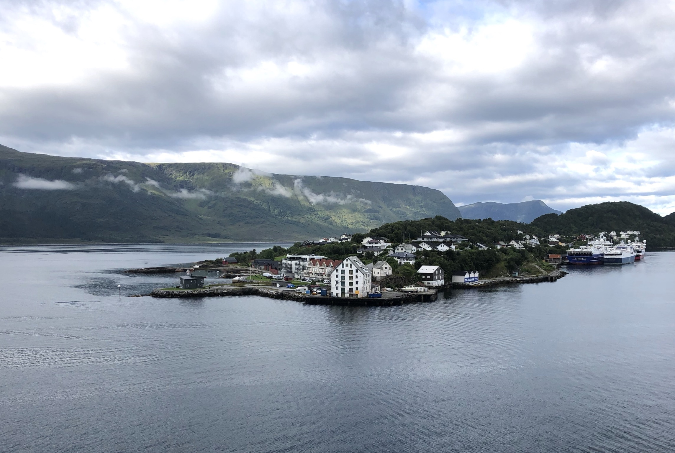 Slinningbua 2019